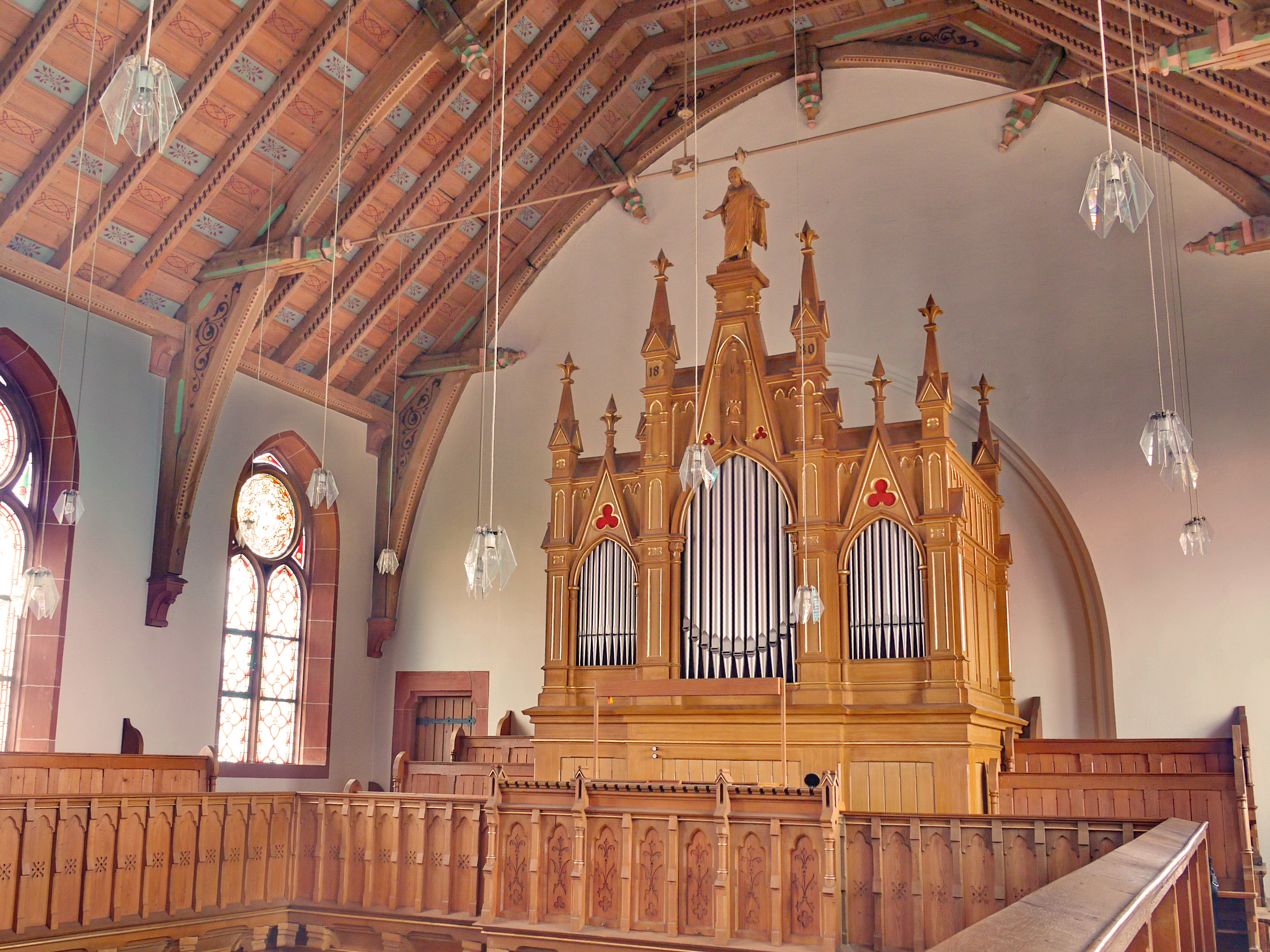 Orgel der Kirche in Annerod, Fernwald, Landkreis Gießen, Hessen